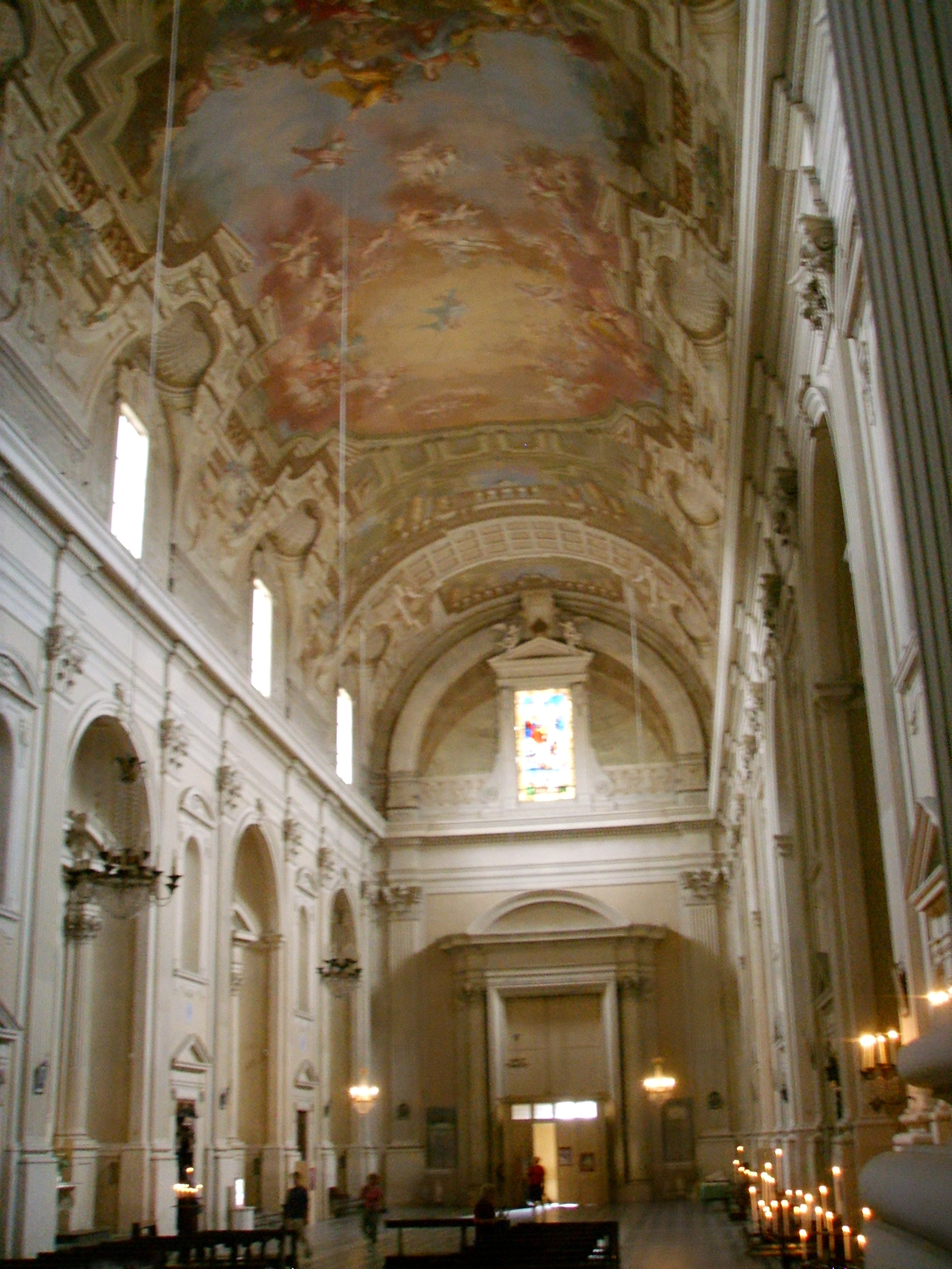 Santa Maria del Carmine, inside, Florence, Italy